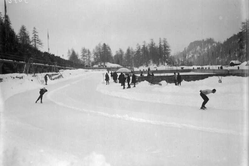 Moment aus dem 5.000 m Eis-Schnellauf in St. Moritz. Der gute Eis-Schnelläufer Carlson/Norwegen (schwarzes Hemd) und der deutsche Recordläufer Mayke (weisses Hemd) während des 5.000 m Laufes.